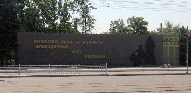 Патріотам-іллічівцям